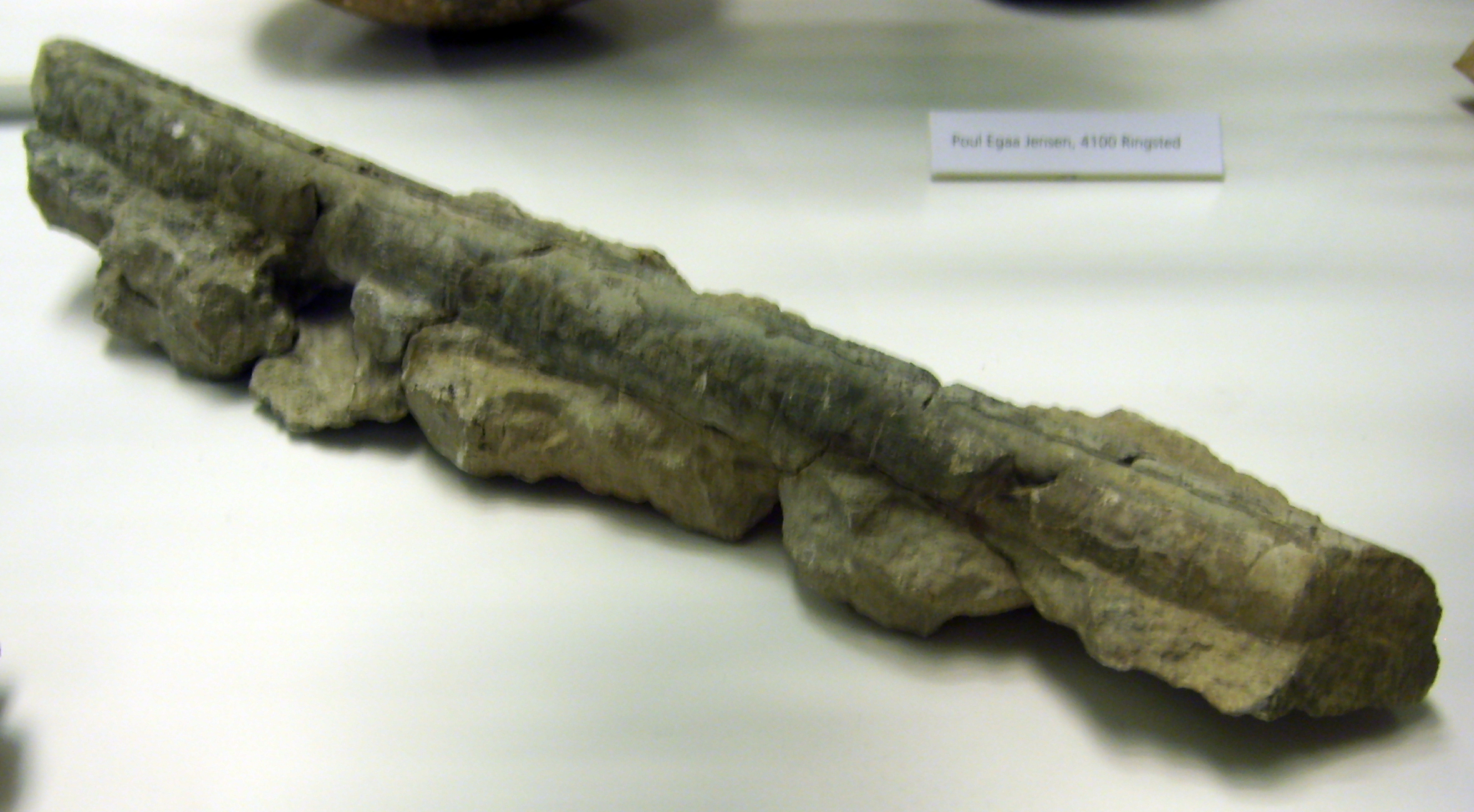 Endoceras from Stevns, Denmark, Zoologisk Museum.